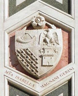 Stemma Gerini-Magnani sulla facciata del duomo di Firenze